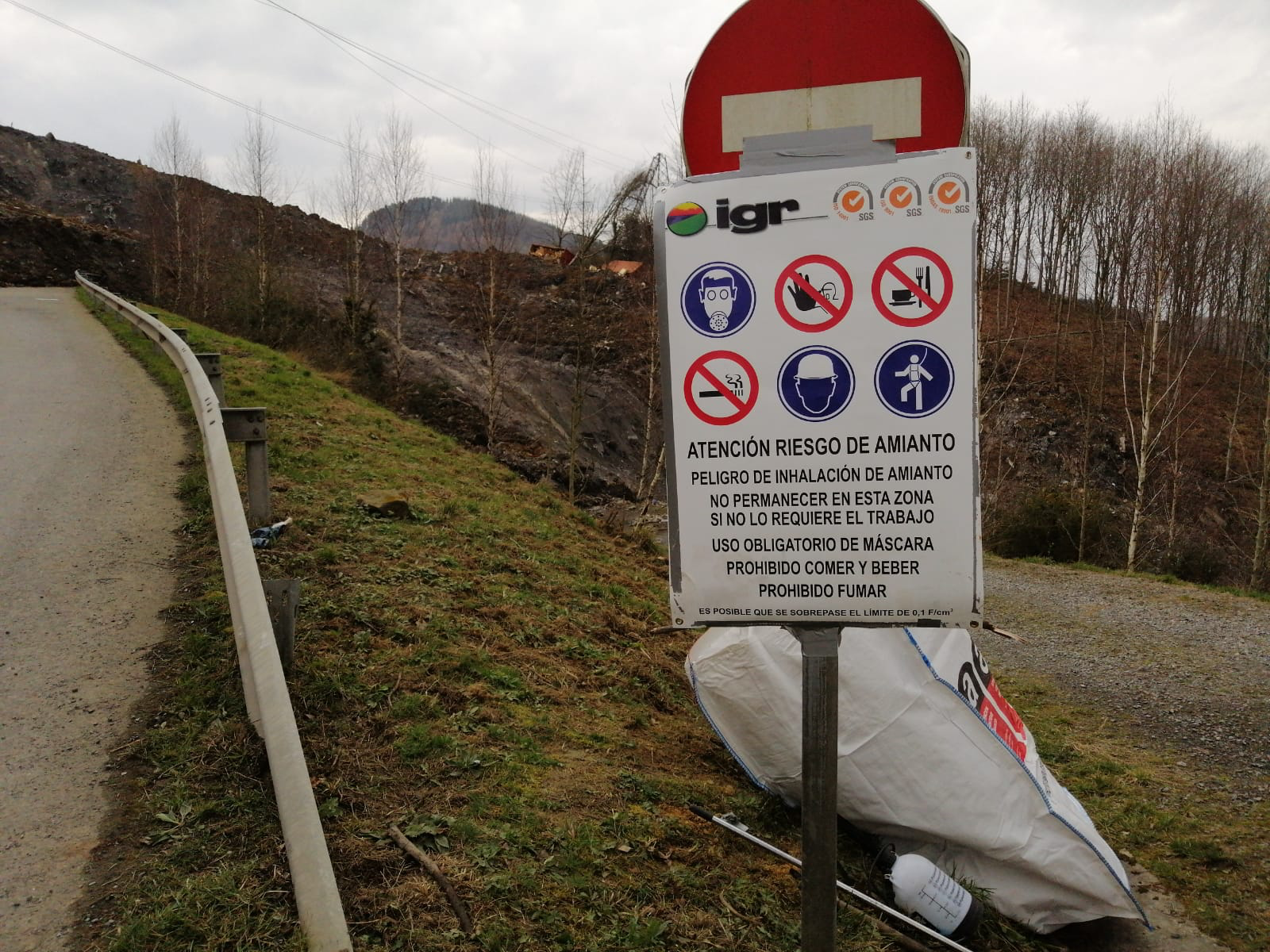 Amianto arriskuaren berri, Zaldibarko zabortegian, erdara hutsean.